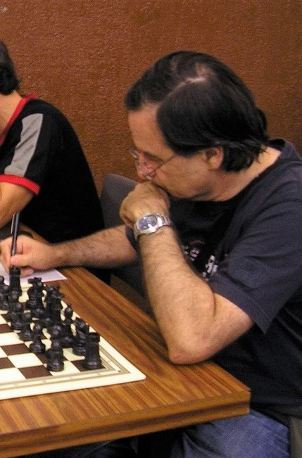 GM Roberto Cifuentes Parada